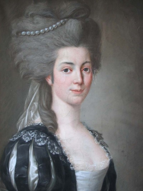 Leonor de Almeida Portugal, Marquesa de Alorna en Viena en 1780.